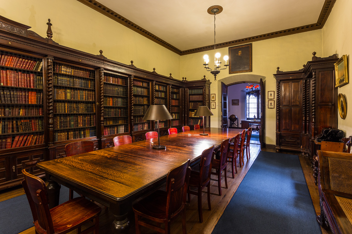 Casa del Brig. Gral. Juan Antonio Lavalleja - Museo Histórico Nacional. Ubicada en el departamento de Montevideo